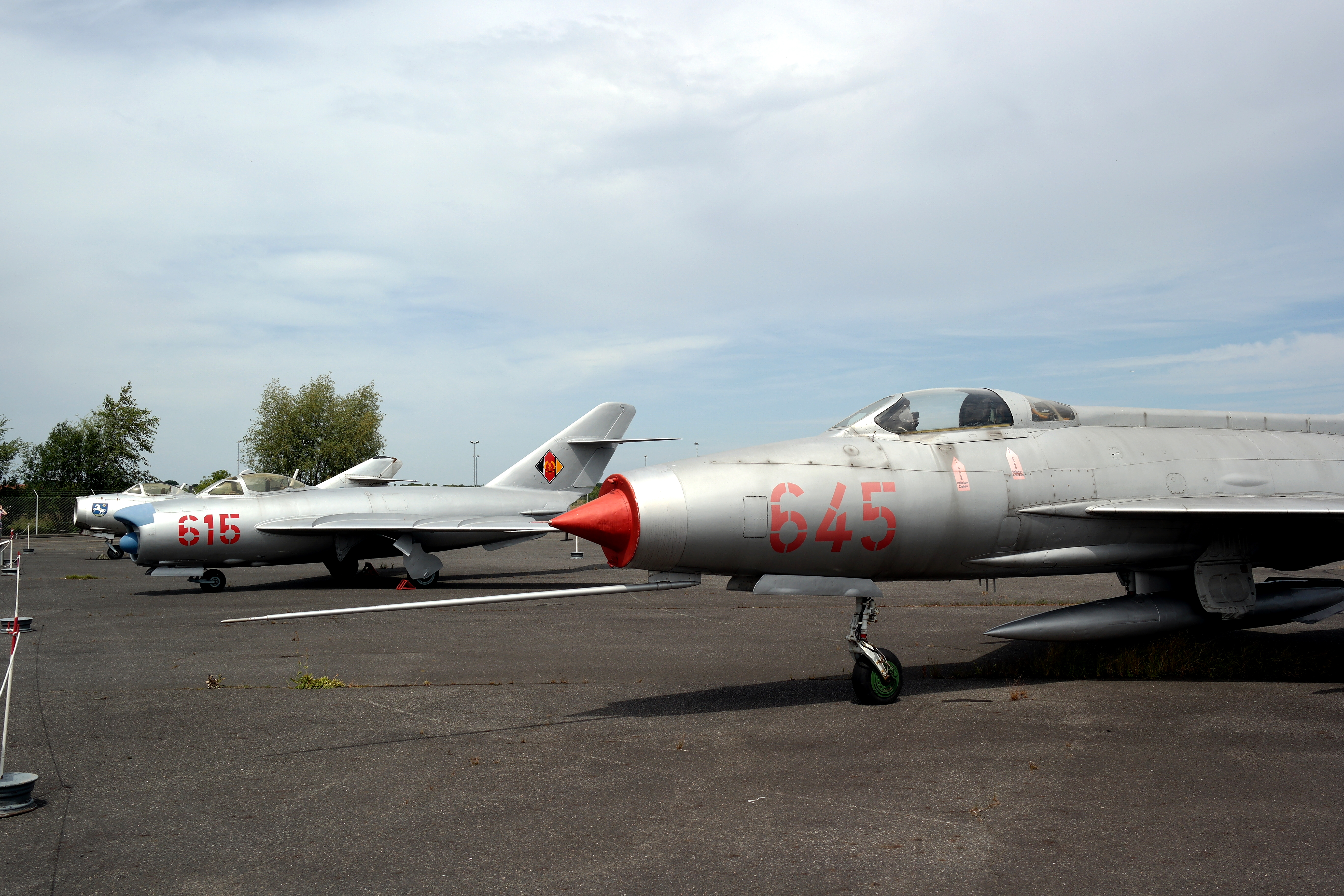 MIG-21 - Militaerhistorisches Museum der Bundeswehr Flugplatz Berlin-Gatow